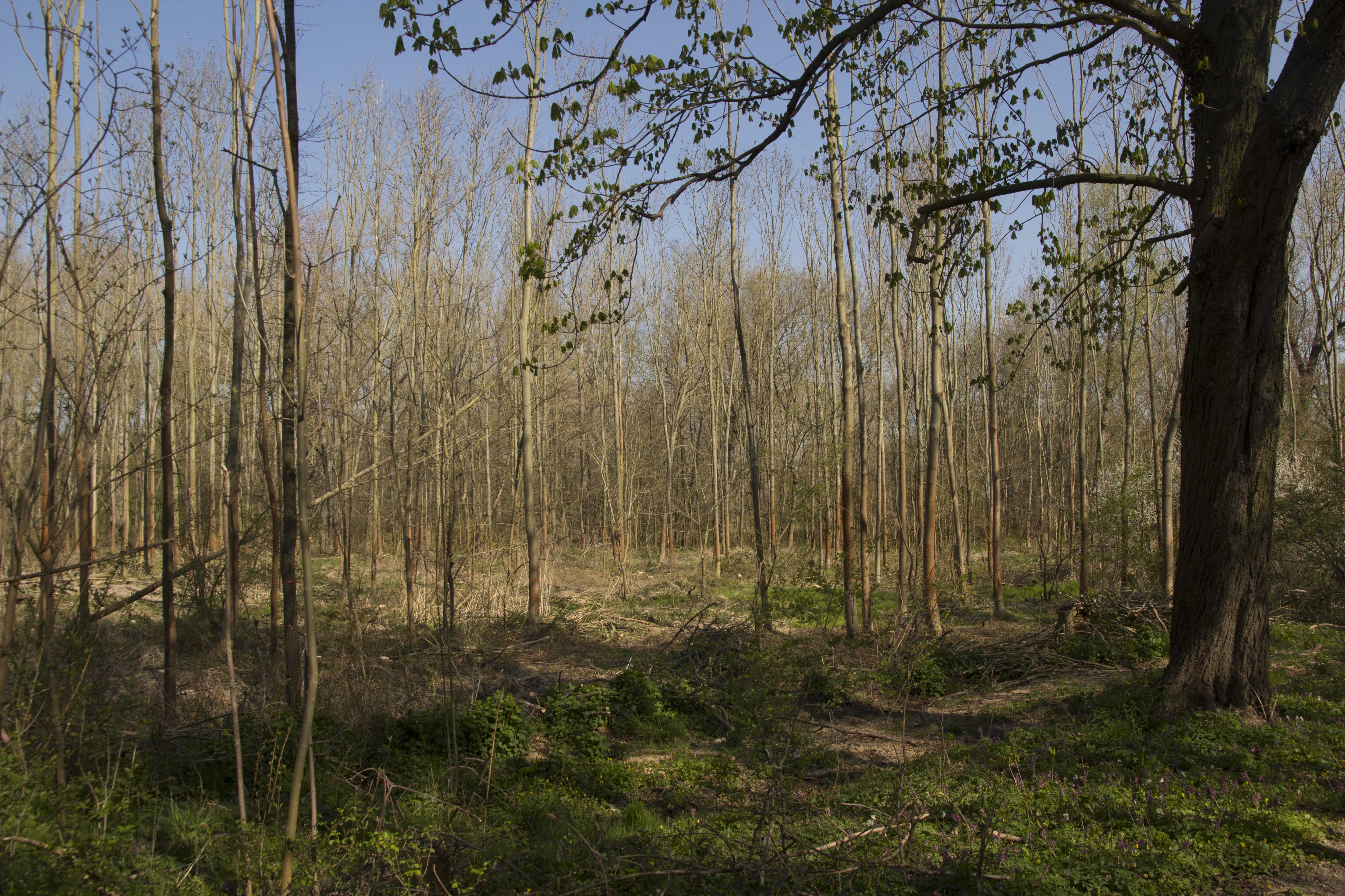 NSG Auwald an der Saale zwischen Plötzkau und Bernburg.